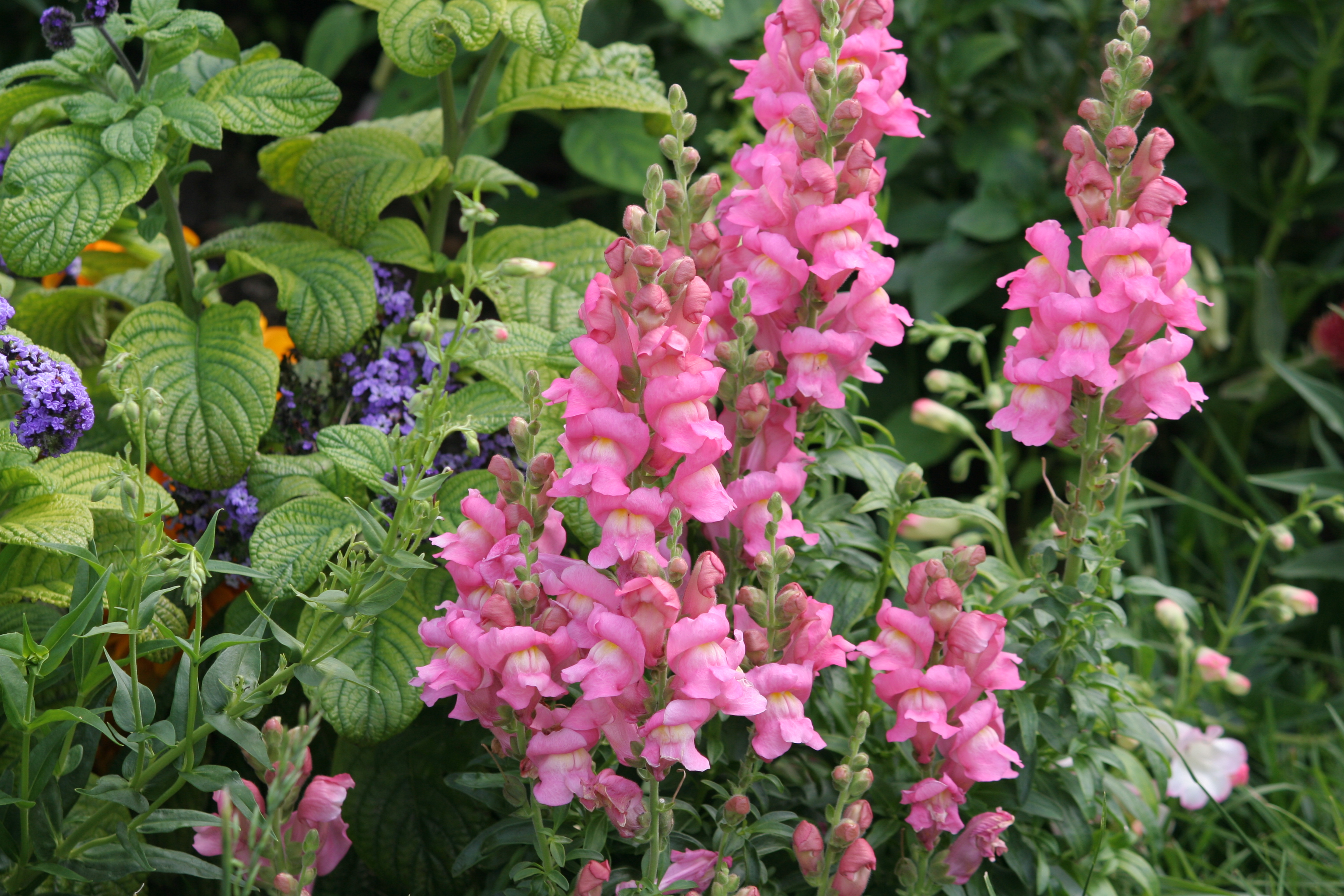 fleur inconnue